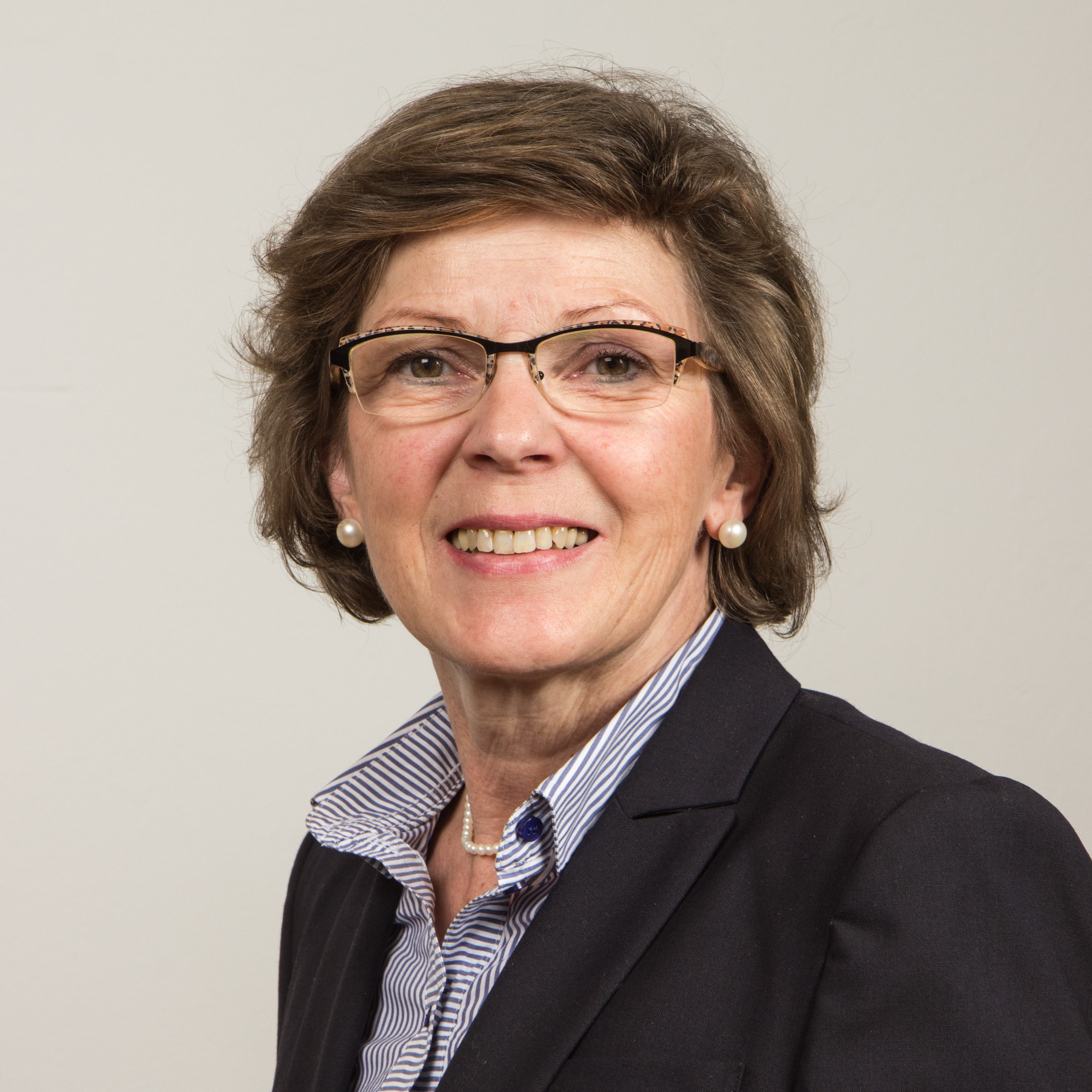 Die rheinland-pfälzische Landtagsabgeordnete Monika Becker